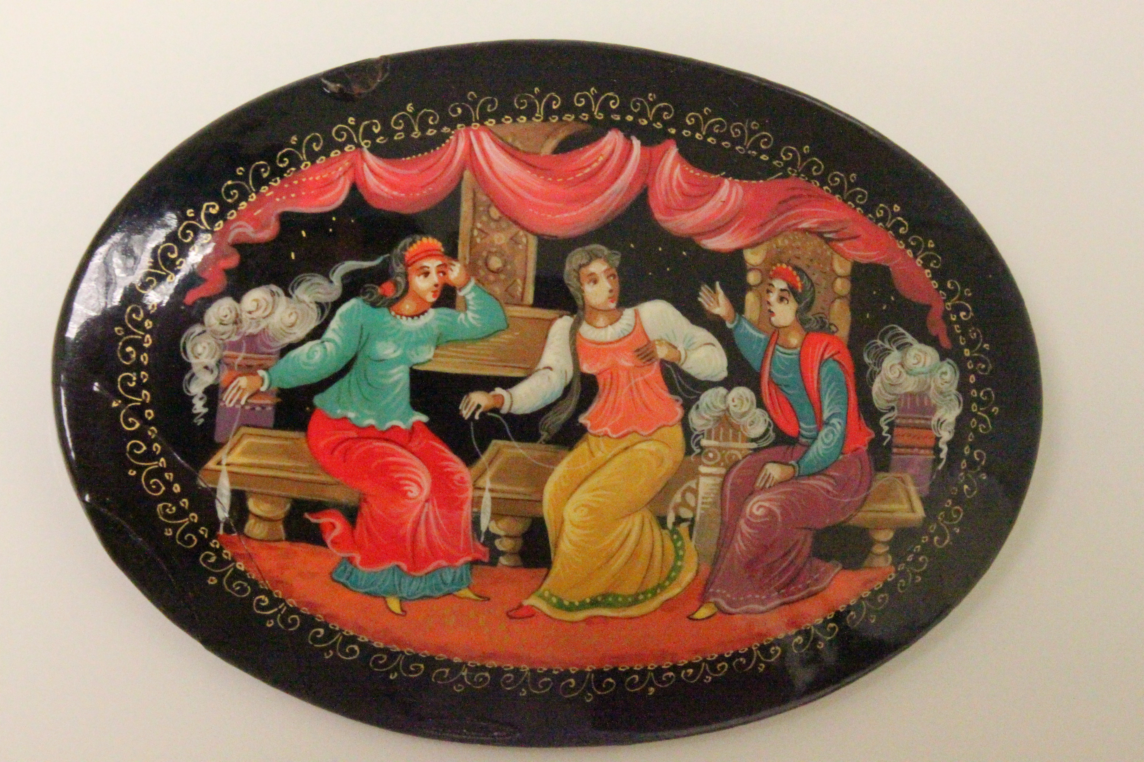 Brosche: Lackminiatur aus Mstjora; Russische Beschriftung der Rückseite der Brosche: Мстьра. „Три девицы под окном ...“ К. А. ; - "Das Märchen vom Zaren Saltan" ist ein Gedicht von Alexander Puschkin, nach dem gleichnamigen russischen Märchen (niedergeschriben von Wladimir Iwanowitsch Dal); Der Beginn der Anfangszeile des Gedichtes „Три девицы под окном“: "Три девицы под окном, пряли поздно вечерком" (Drei Mädchen am Fenster spannen spät am Abend)